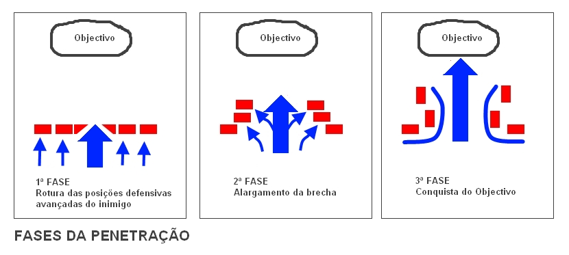 Fases da Penetração (forma de manobra ofensiva)